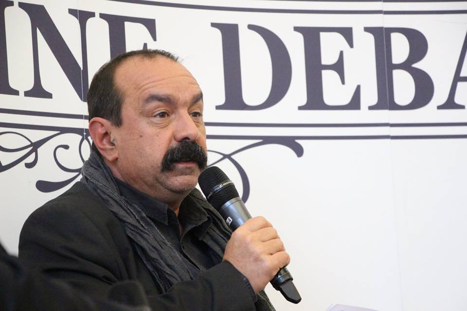 Philippe Martinez lors d'un débat à l'université Paris-Dauphine